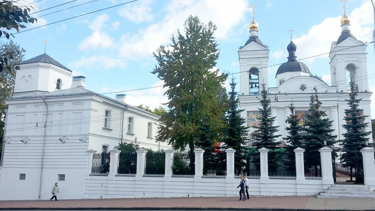 Беларуская (тарашкевіца): Комплекс былога кляштара трынітарыяў: касьцёл, кляштарны корпус. г. Віцебск This is a photo of Belarusian heritage monument. Reference number: 212Г000044 ( WLM)